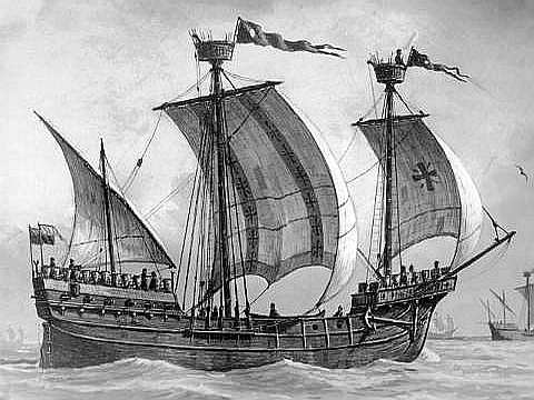 Hansekogge, um 1480, mit Lübecker Flaggen